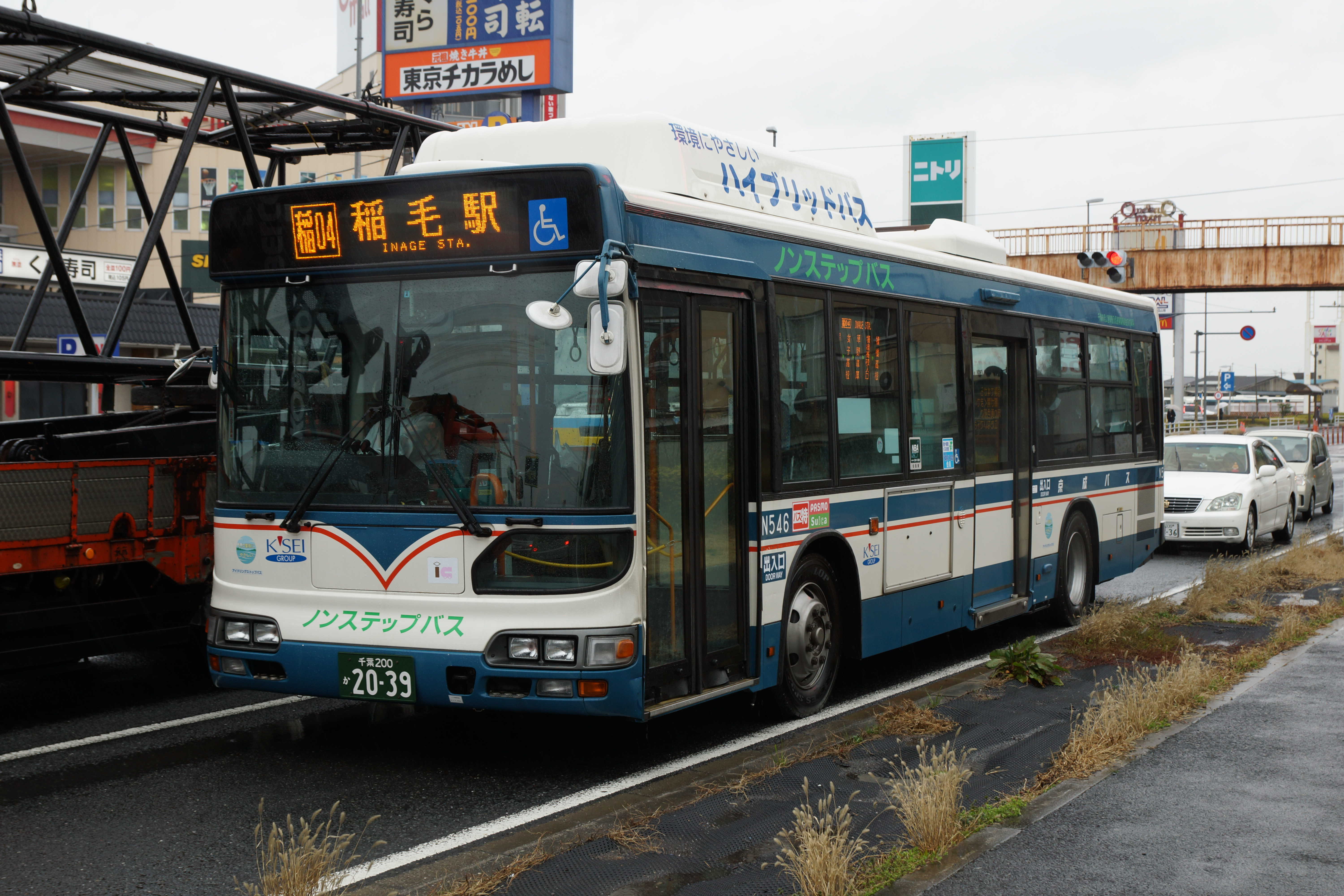 2014年3月13日に運行された臨時バス